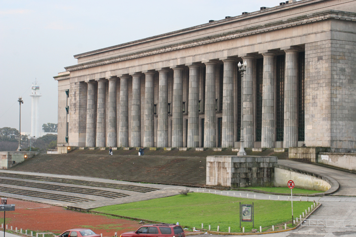 Facultad de Derecho (Av. Figueroa Alcorta 2263), Universidad de Buenos Aires, Buenos Aires, Argentina